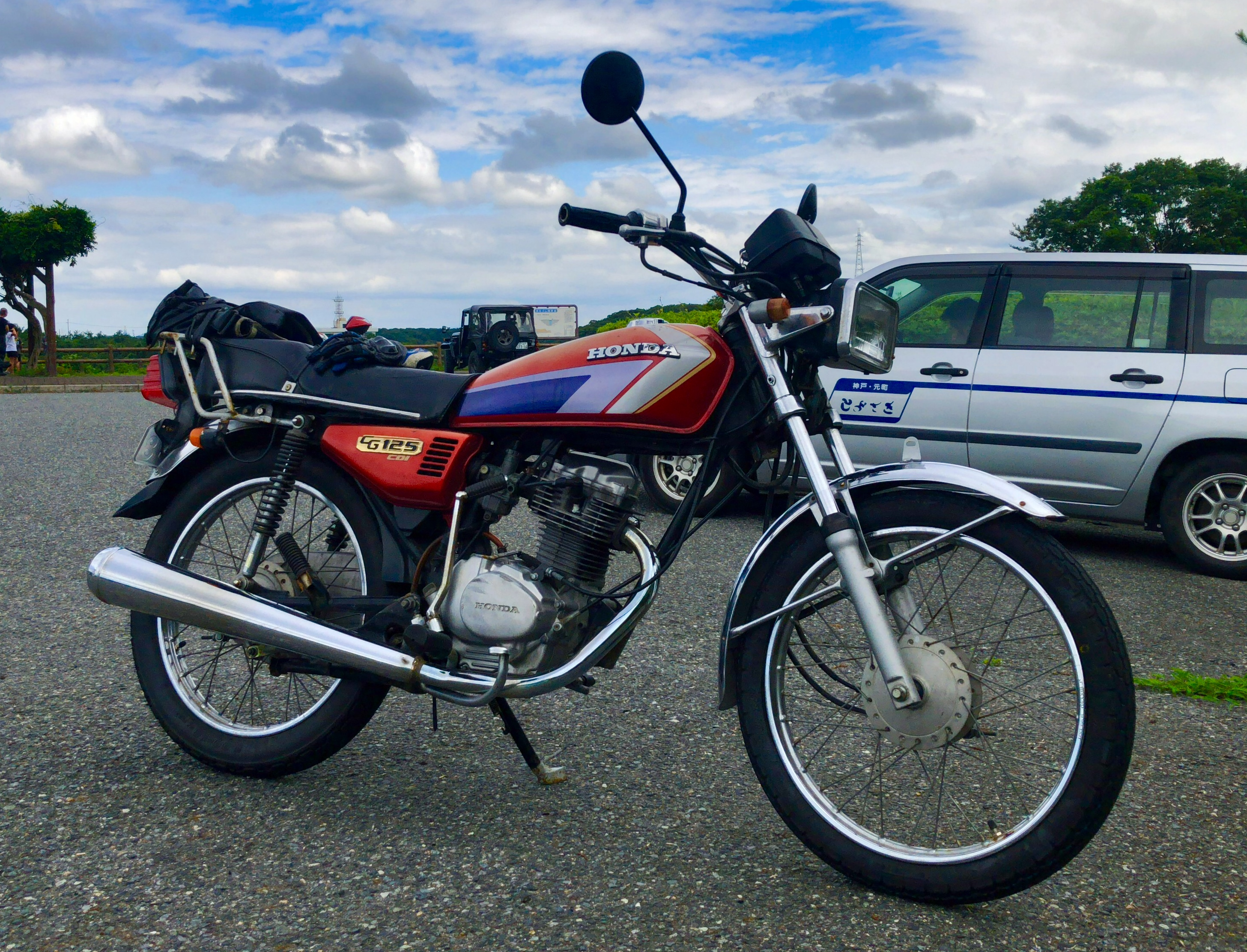 熊本生産モデル